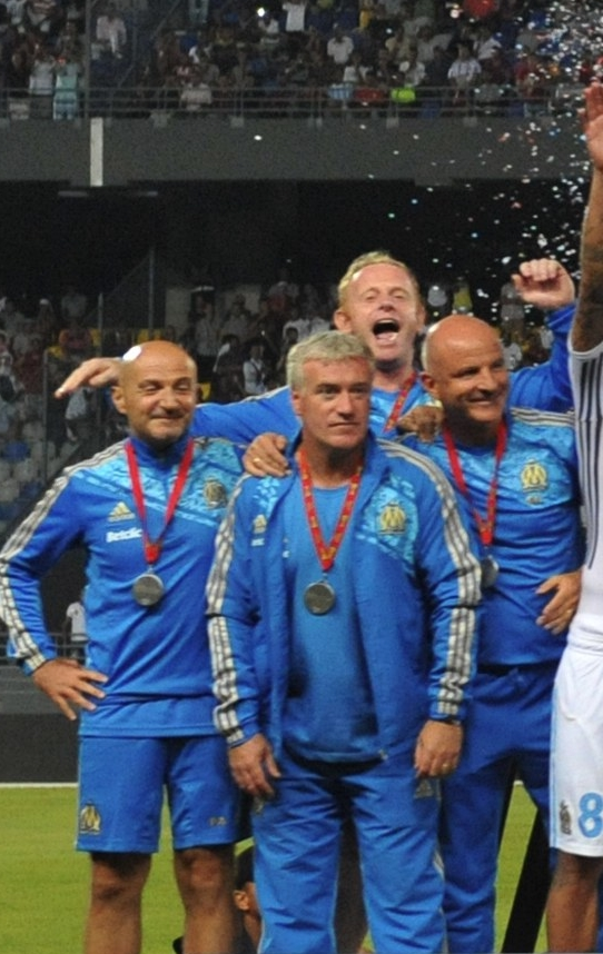 De gauche à droite : Antonio Pintus, Didier Deschamps, Nicolas Dehon, Guy Stéphan vainqueurs du Trophée des champions 2011 avec l'Olympique de Marseille.